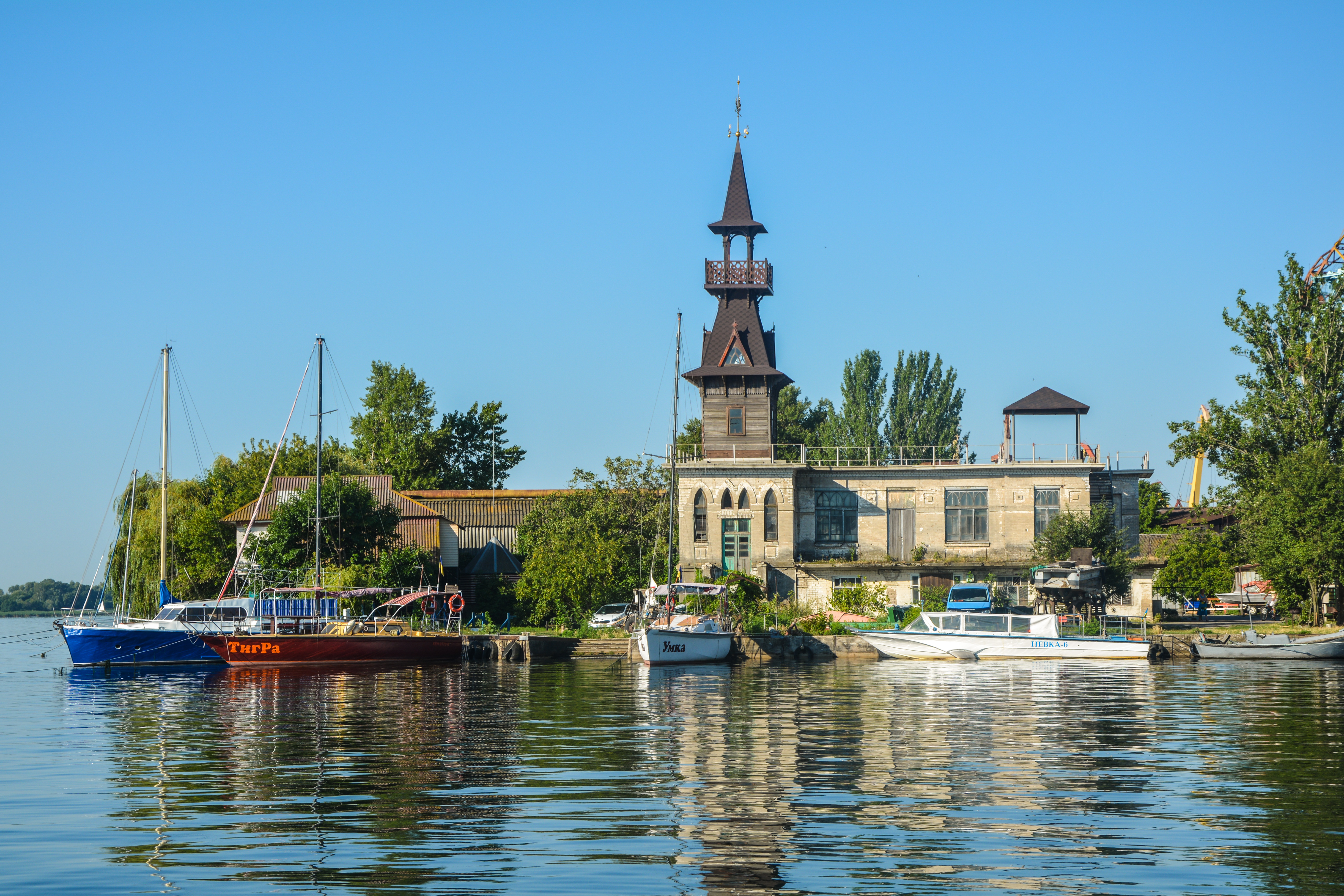 Яхт-клуб у Херсонi